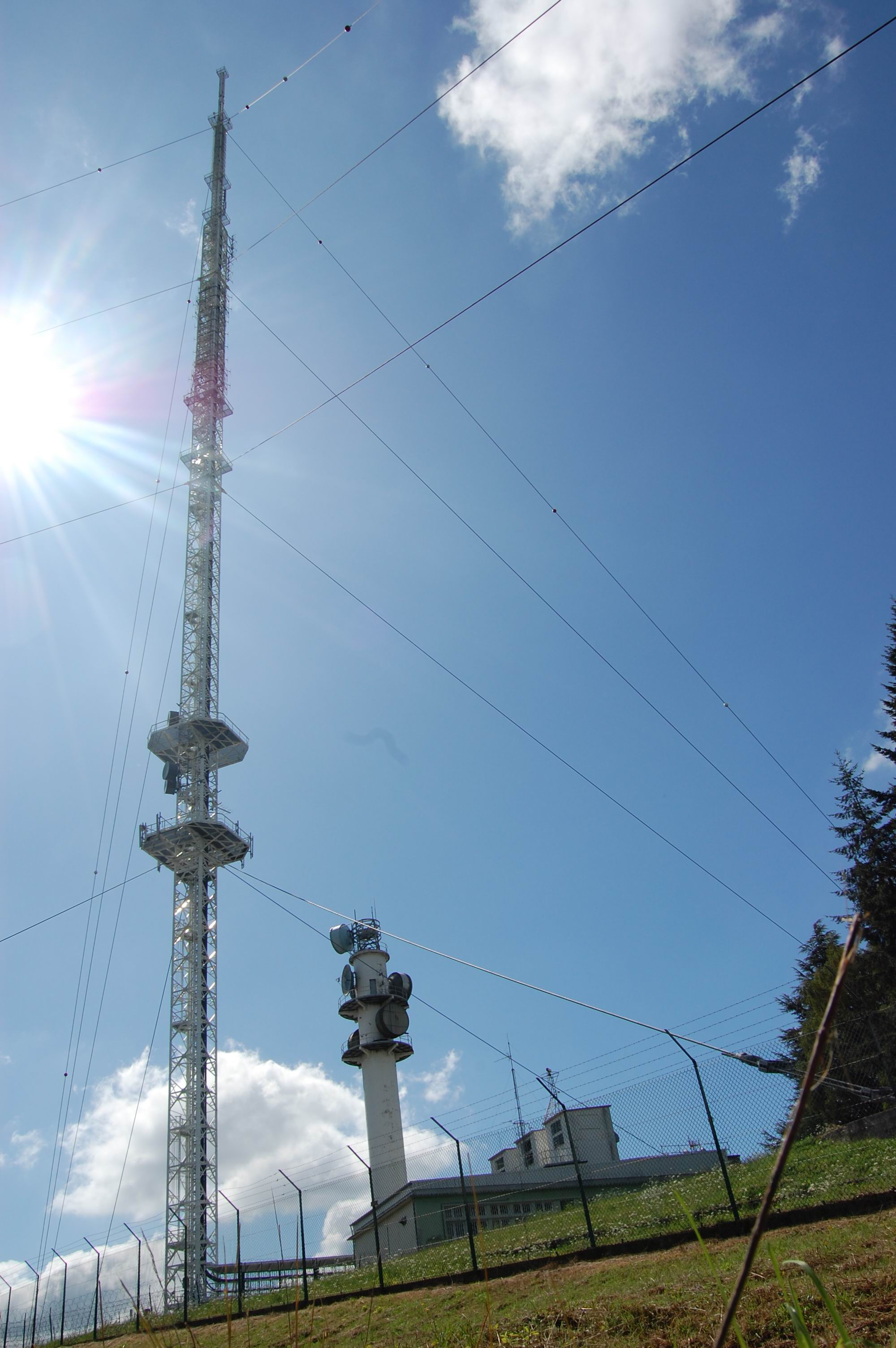 Émetteur de FM et de television avec une tour hertzienne avec une hauteur de 200 metres dite " Antenne des Cars"